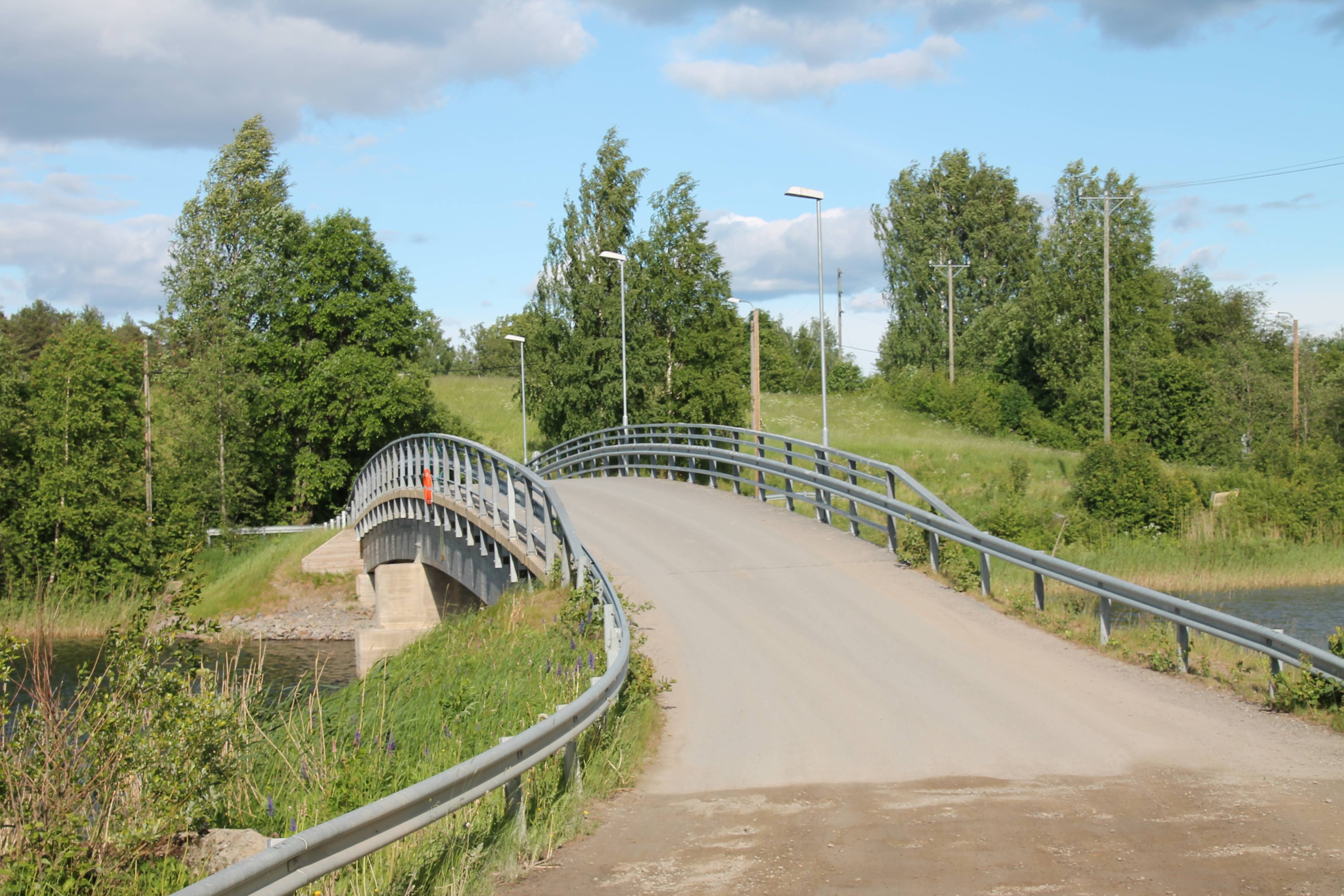 Liisalan silta Sorsakoskella lännestä päin katsottuna.